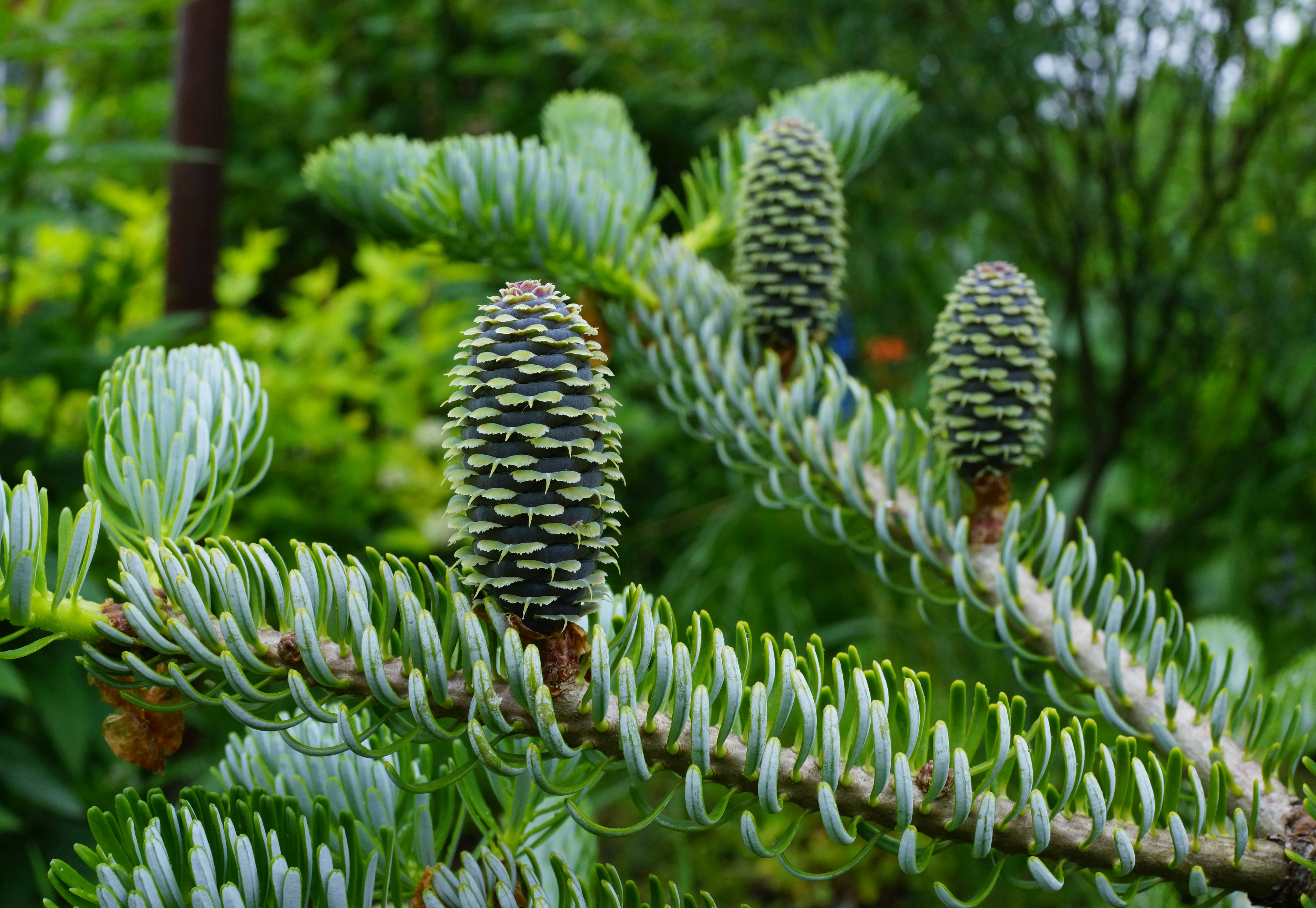 Россия, Владимирская область, частный сад